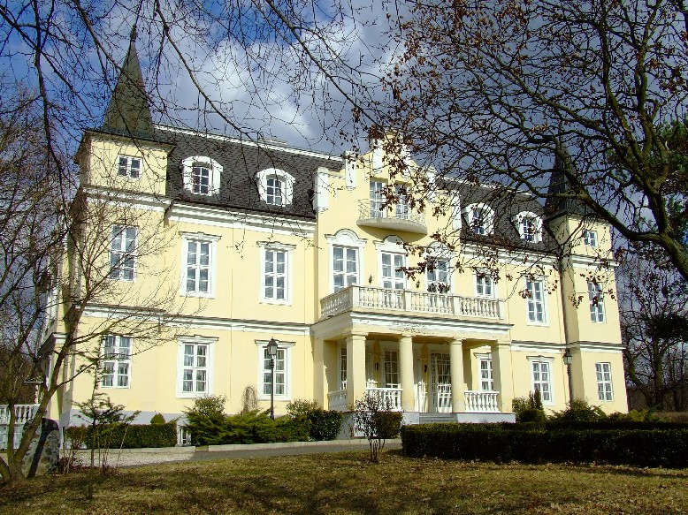 Kállay-kastély Bercelen. Saját kép. . Egresi János 2006. szeptember 23., 10:29 (CEST)